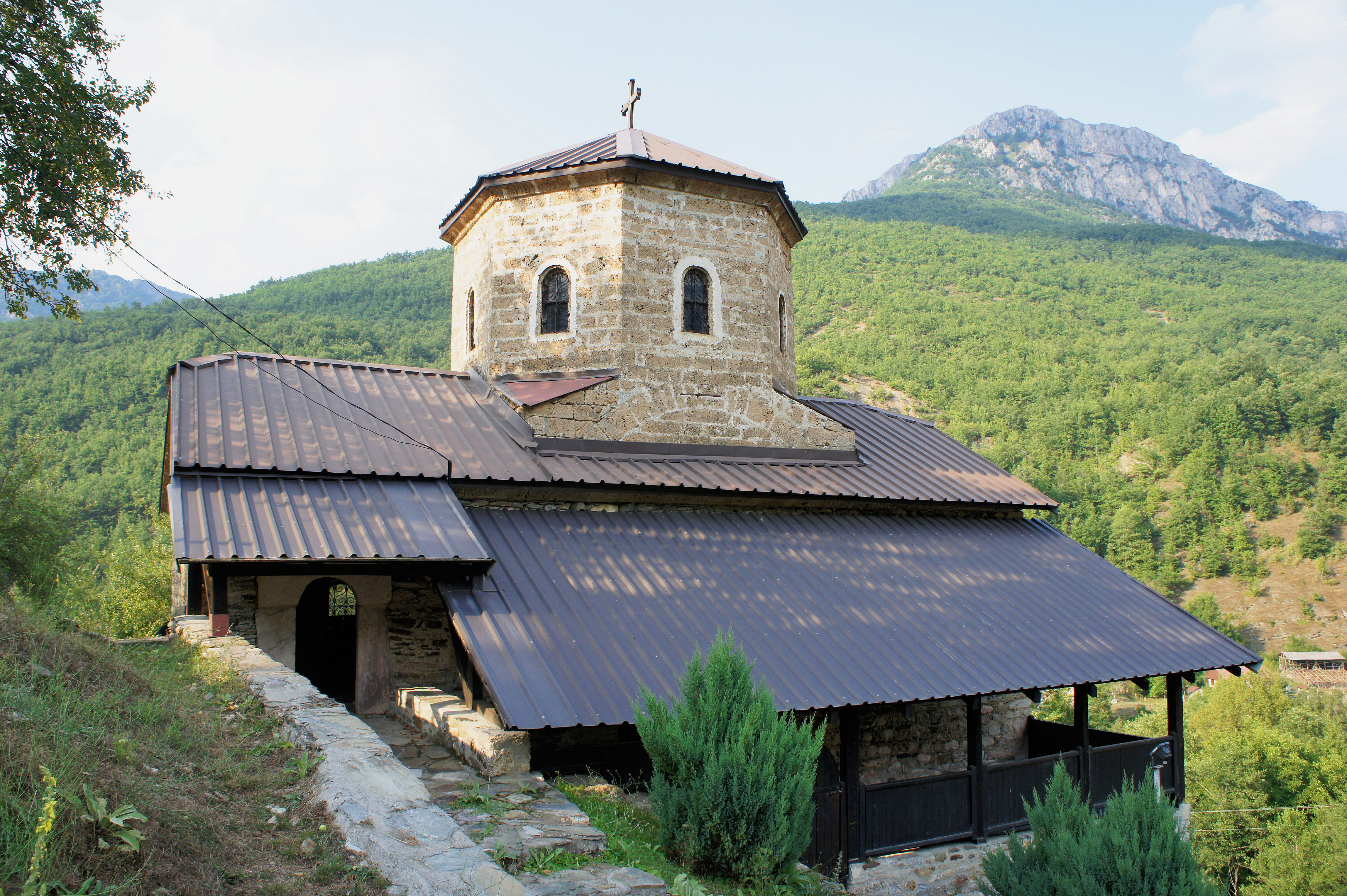 Поглед кон црквата „Св. Никола“ - с. Тресонче